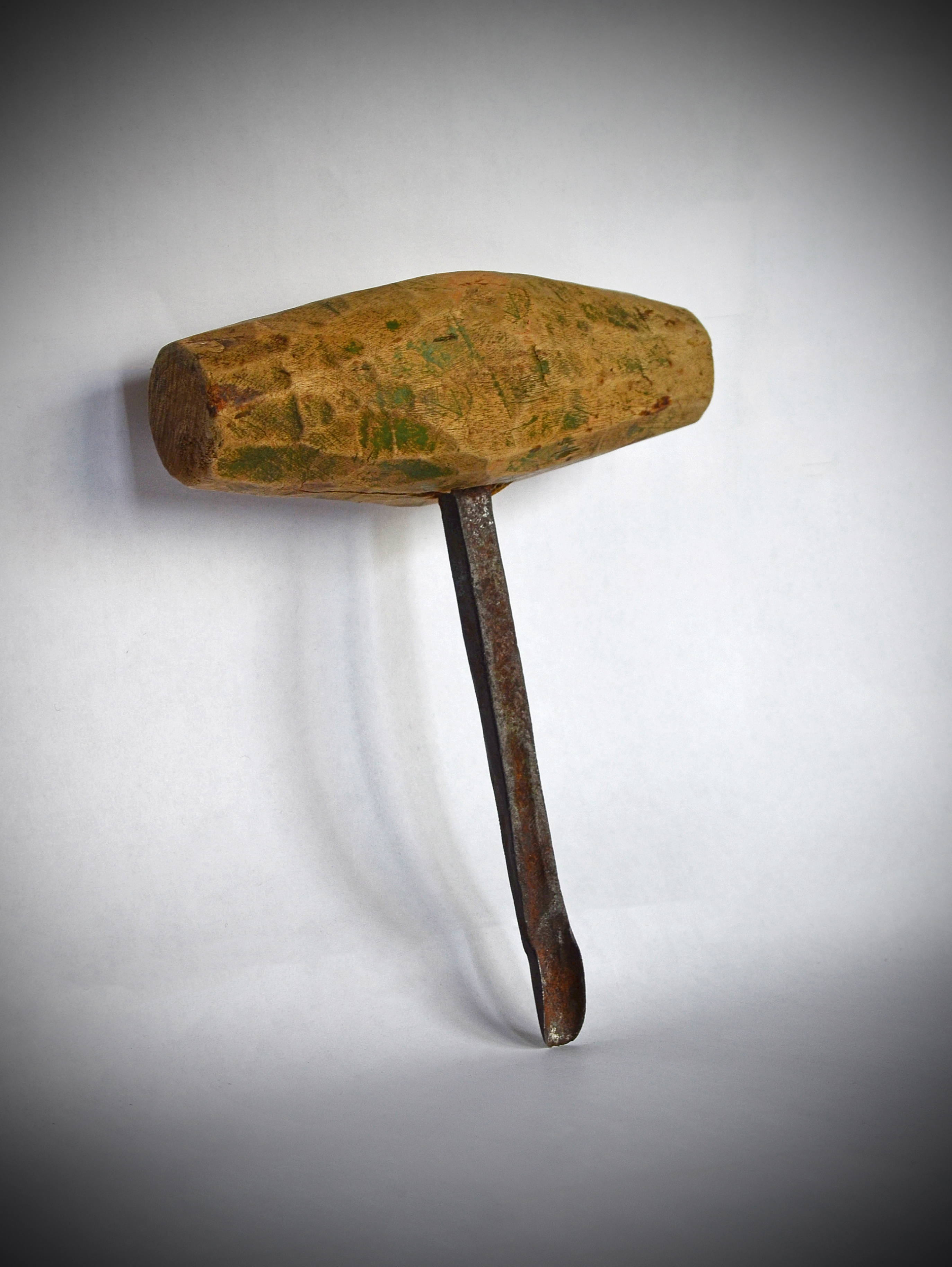 Буравчик старинный.Рязанская губерния,19 век.